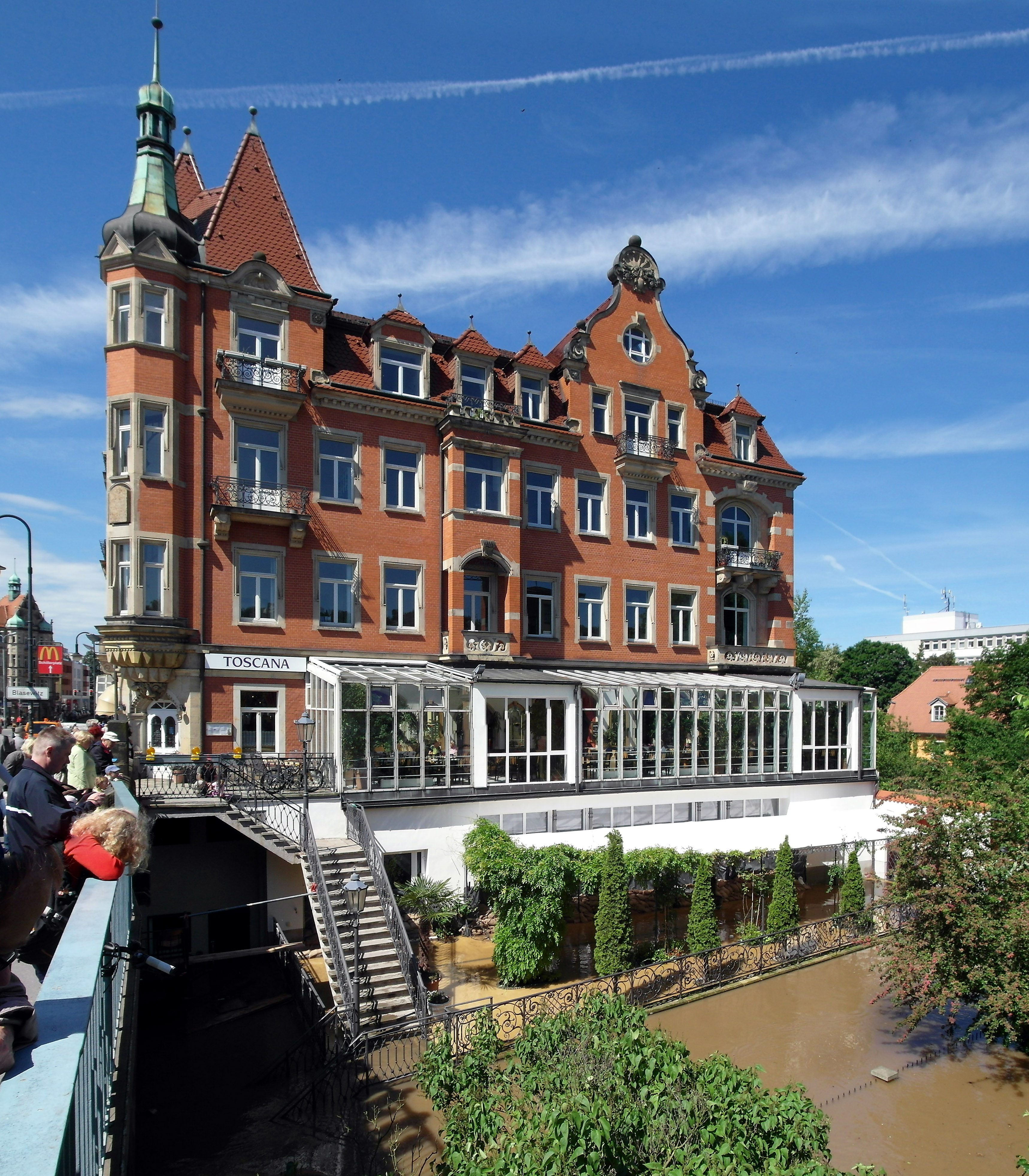 05.06.2013 01309 Dresden-Blasewitz: Cafe Toscana, Schillerplatz 7 (GMP: 51.052766,13.808120) beim Hochwasserpegel der Elbe von ca. 8,40 m. [SAM7024+7026.JPG]20130605075MDR.JPG(c)Blobelt